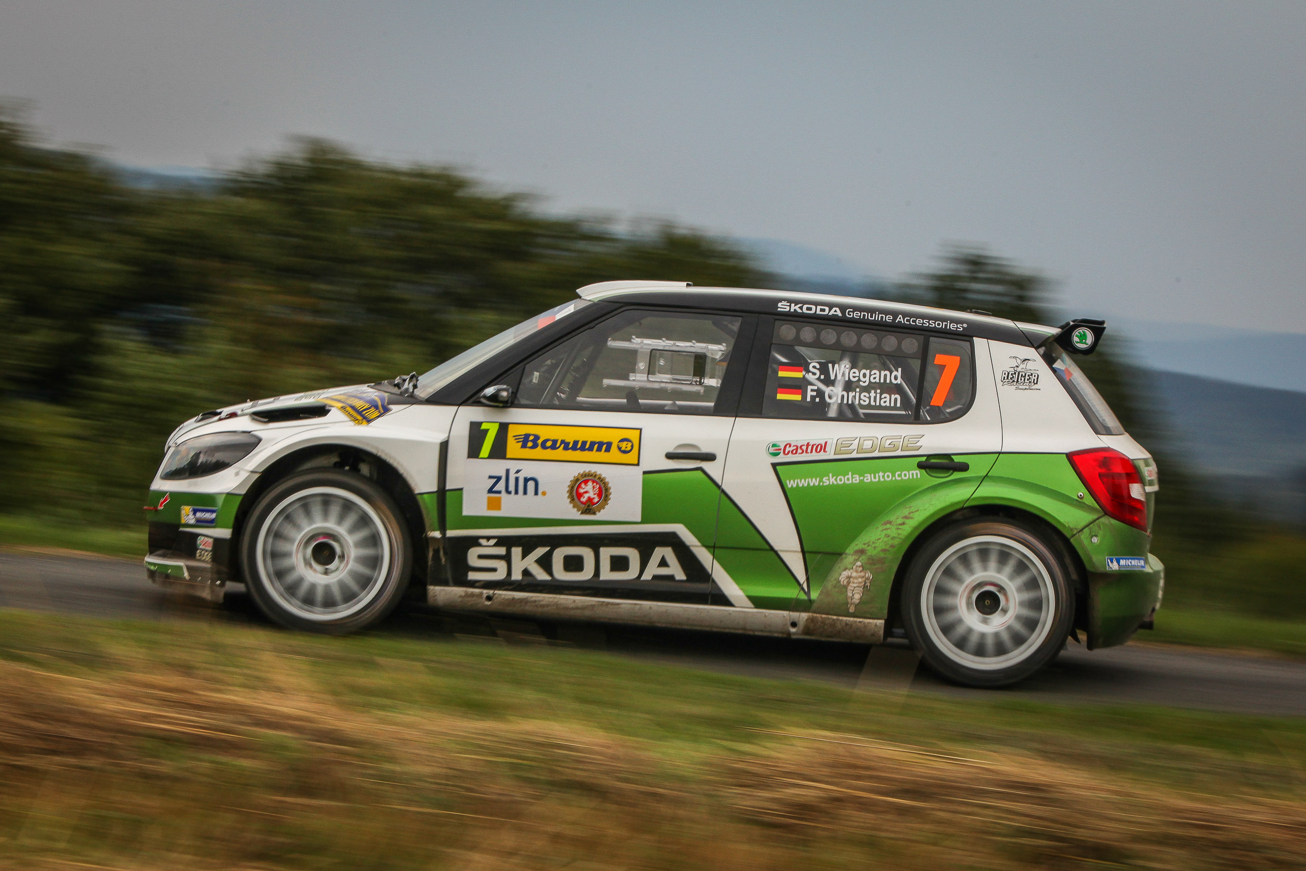 Sepp Wiegand, Frank Christian, Škoda Fabia S2000